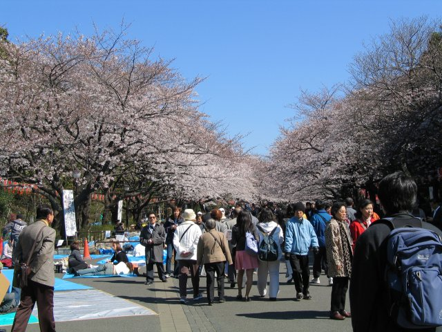 Ueno park during sakura matsuri. Photograph taken by Stephane D'Alu in April 2004.